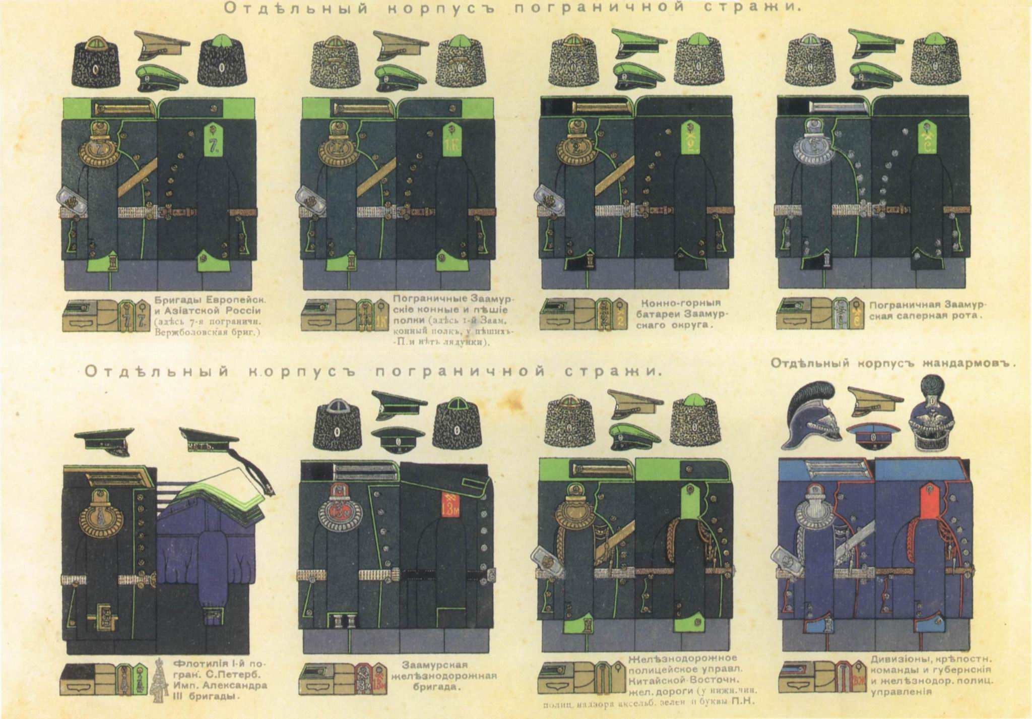 Таблица форм обмундирования Отдельного корпуса пограничной стражи. 1911 год.